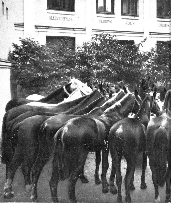 El Instituto Llorente y la Salud Pública. Colección de hermosos caballos, propiedad del Instituto Llorente, inmunizados y dedicados á la obtención de sueros, especialmente del antidiftérico.CAMPÚA